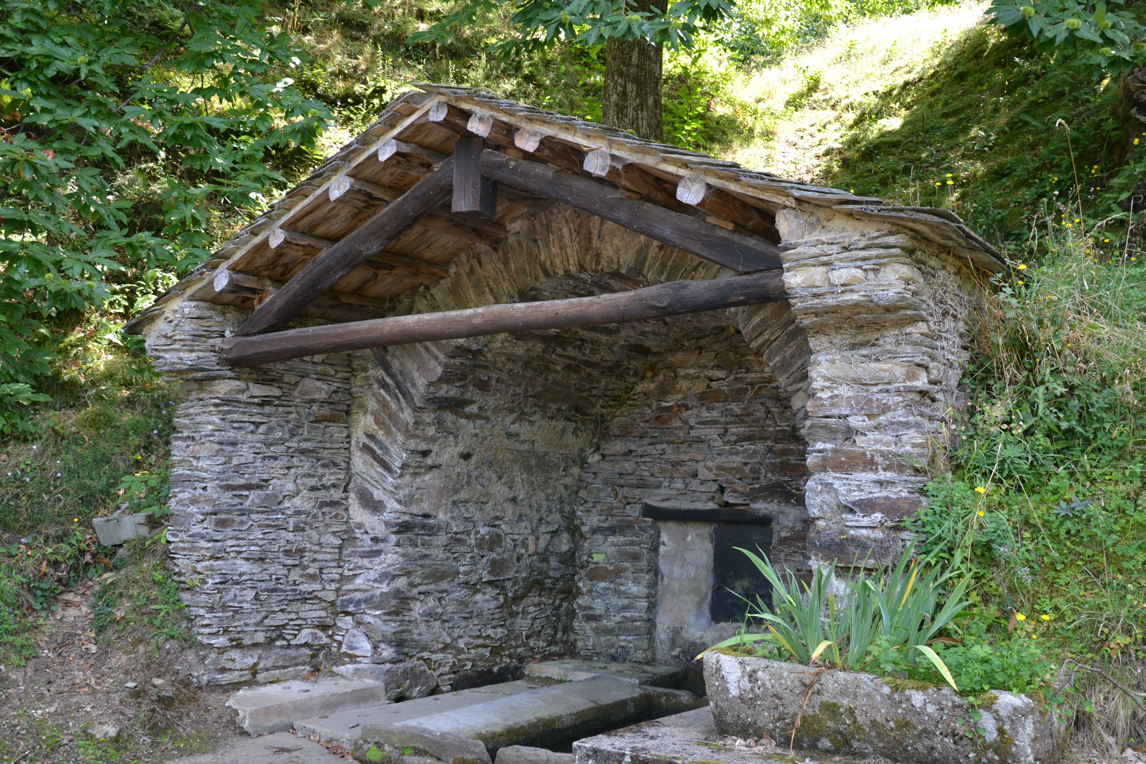 Ancien lavoir de Labastide-Esparbairenque